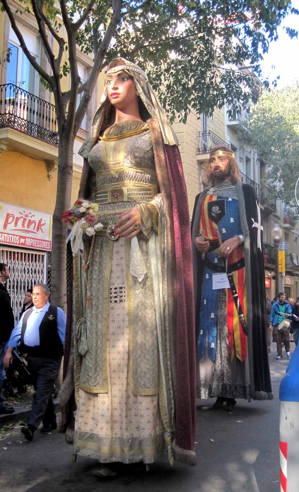 Џинови, фигуре обично направљене од дрвета и картона.